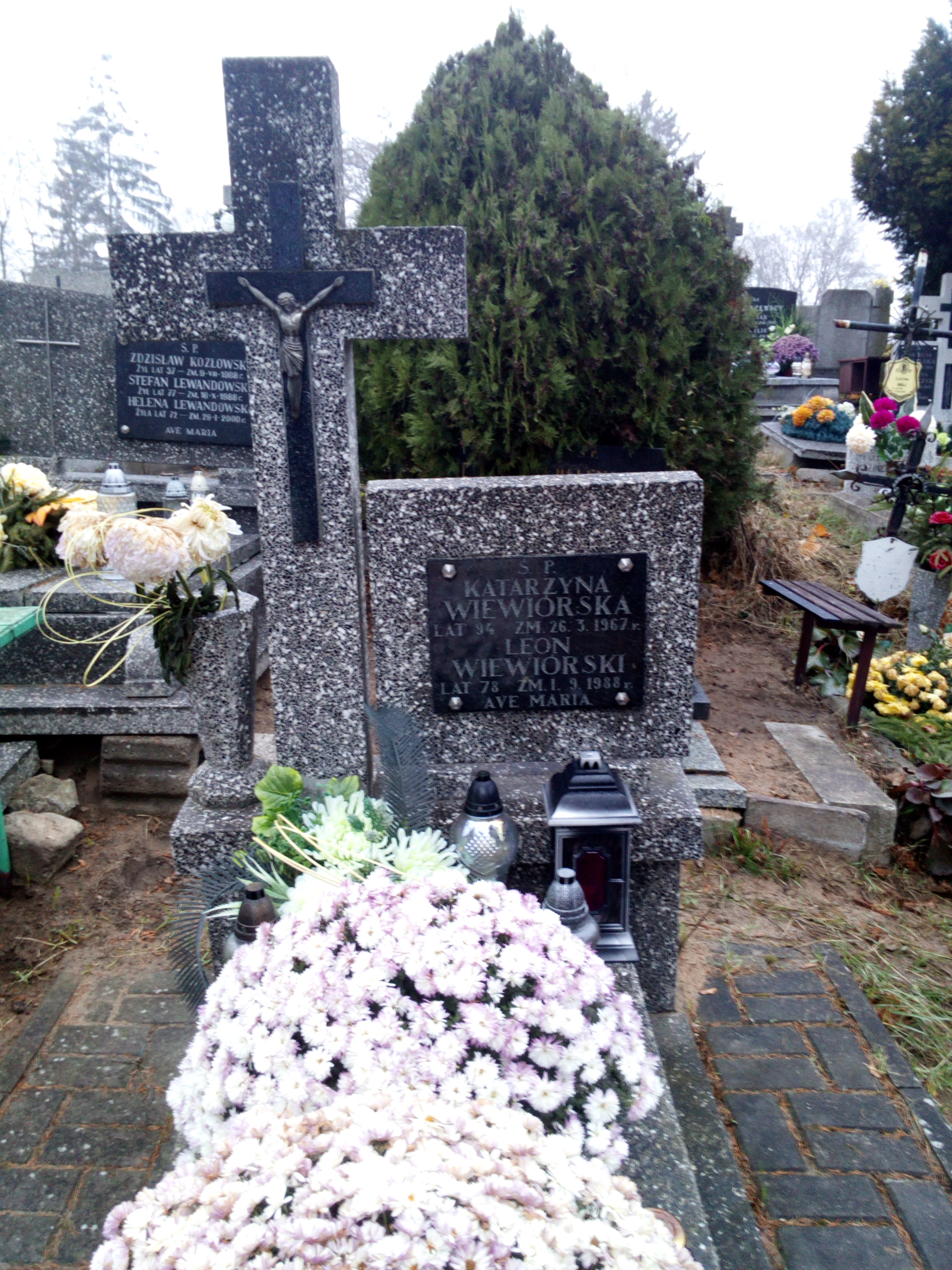 Grób ppor. rez. Leona Wiewiórskiego na włocławskim cmentarzu komunalnym.